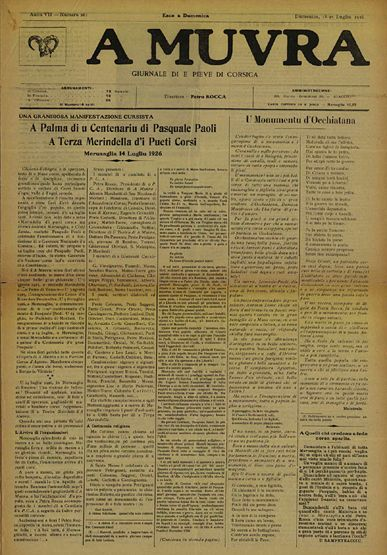 Revista A MUVRA, corse, 1926